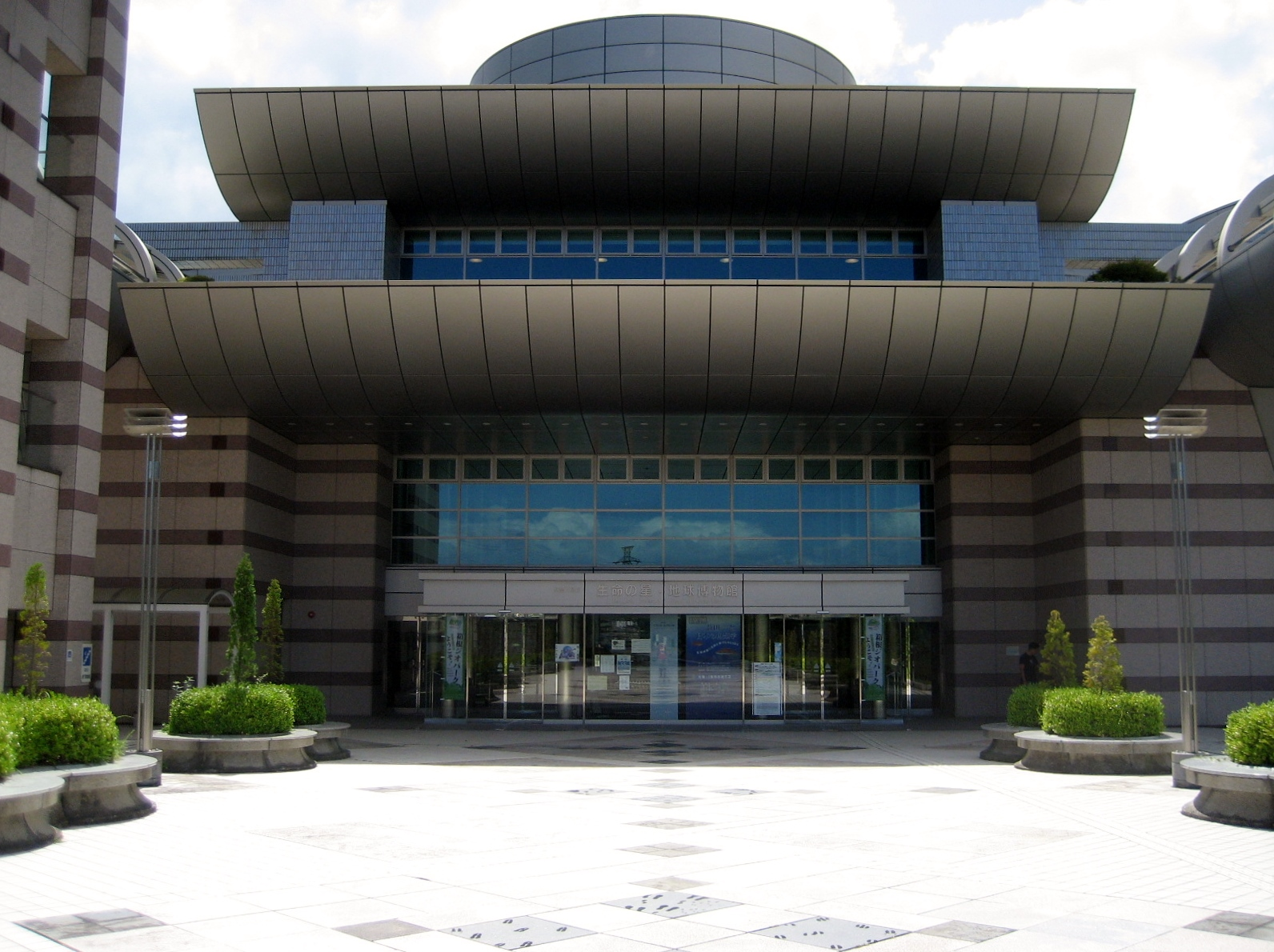 神奈川県立生命の星・地球博物館（神奈川県小田原市）